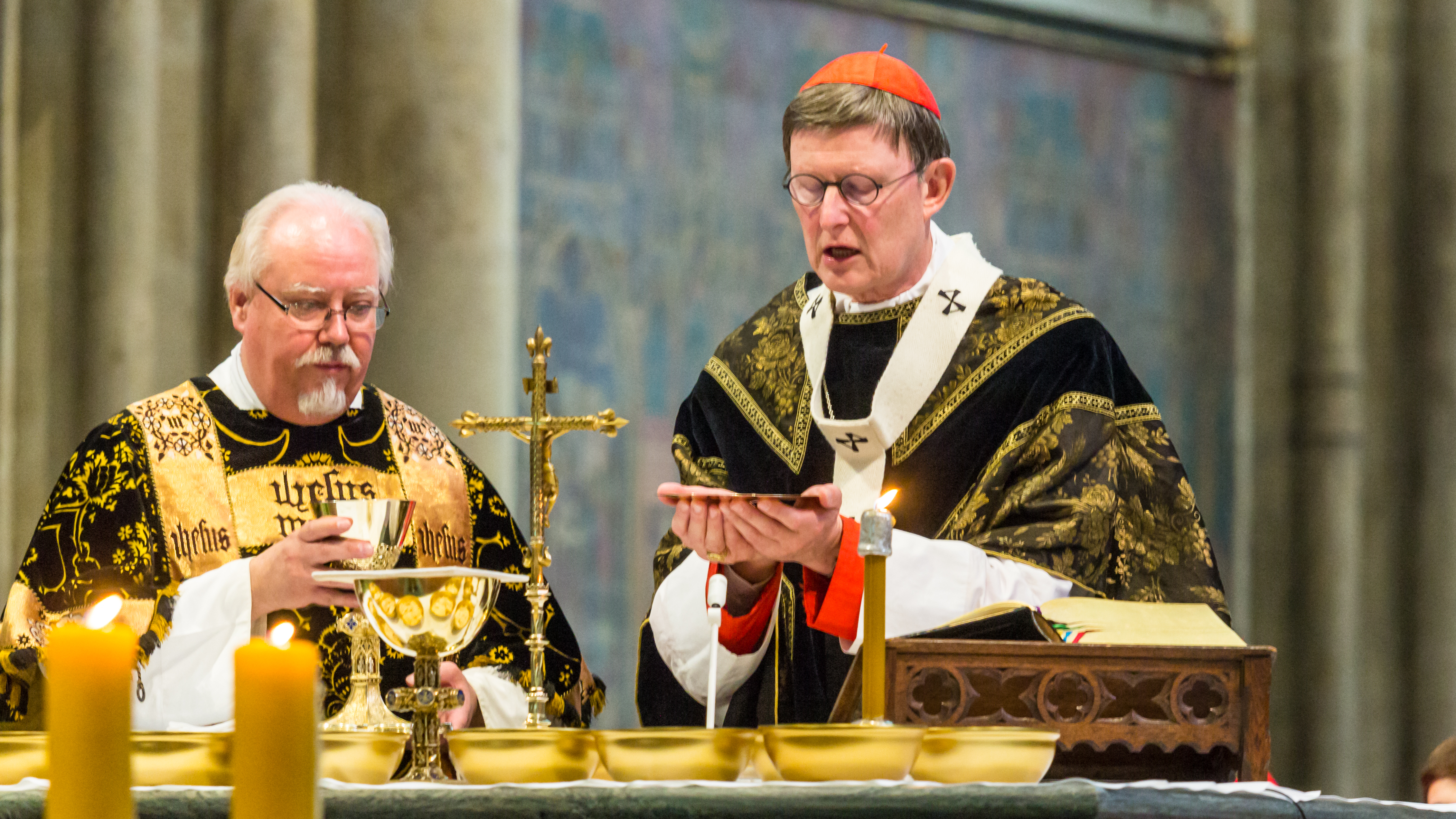 Exsequien Joachim Kardinal em. Meisner